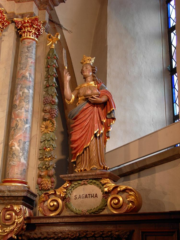 Haupeschkierch zu Munzen: D'Satu vun der Hl. Agatha an der Munzer Kierch.